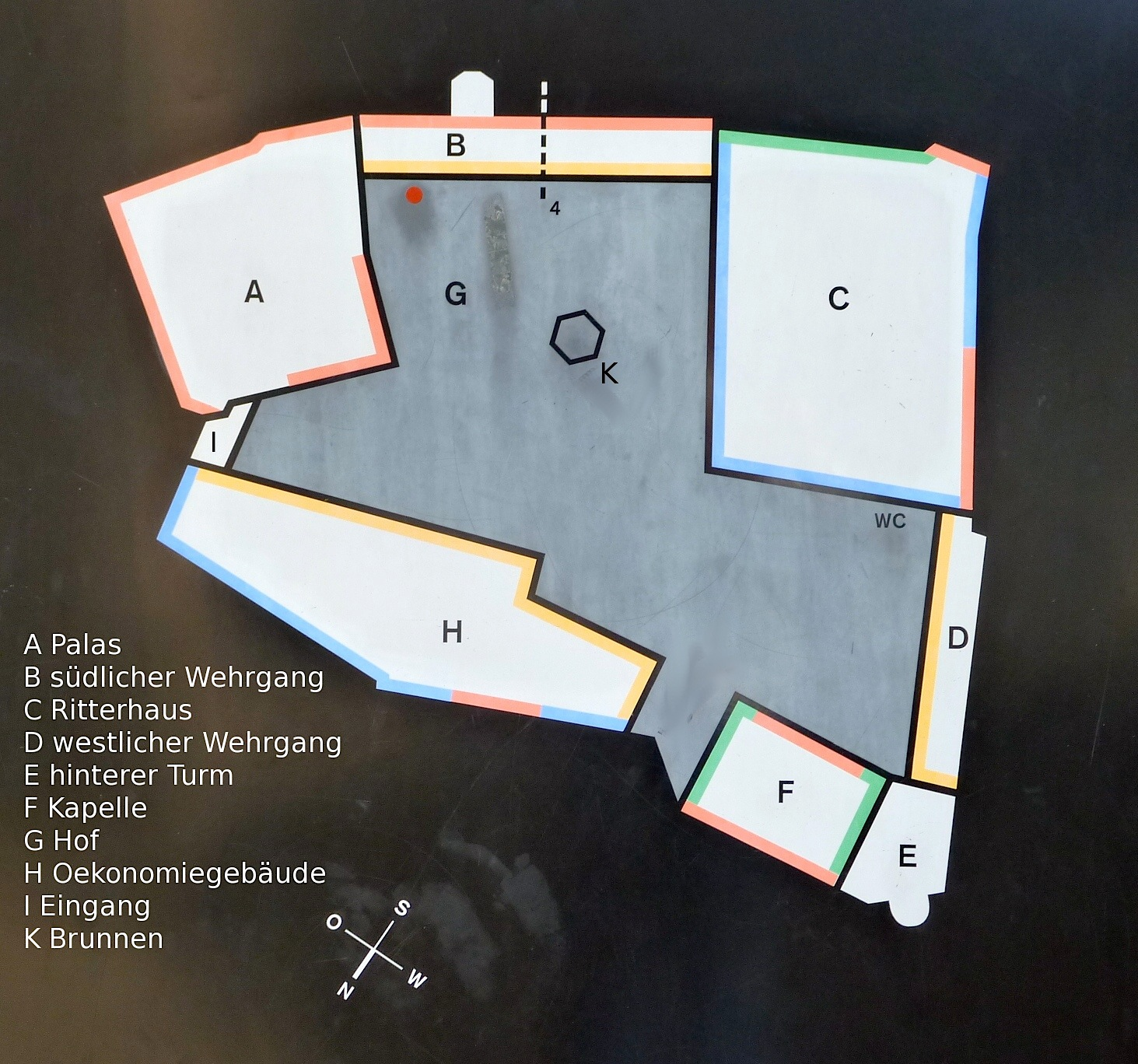 Schloss Kyburg Plan